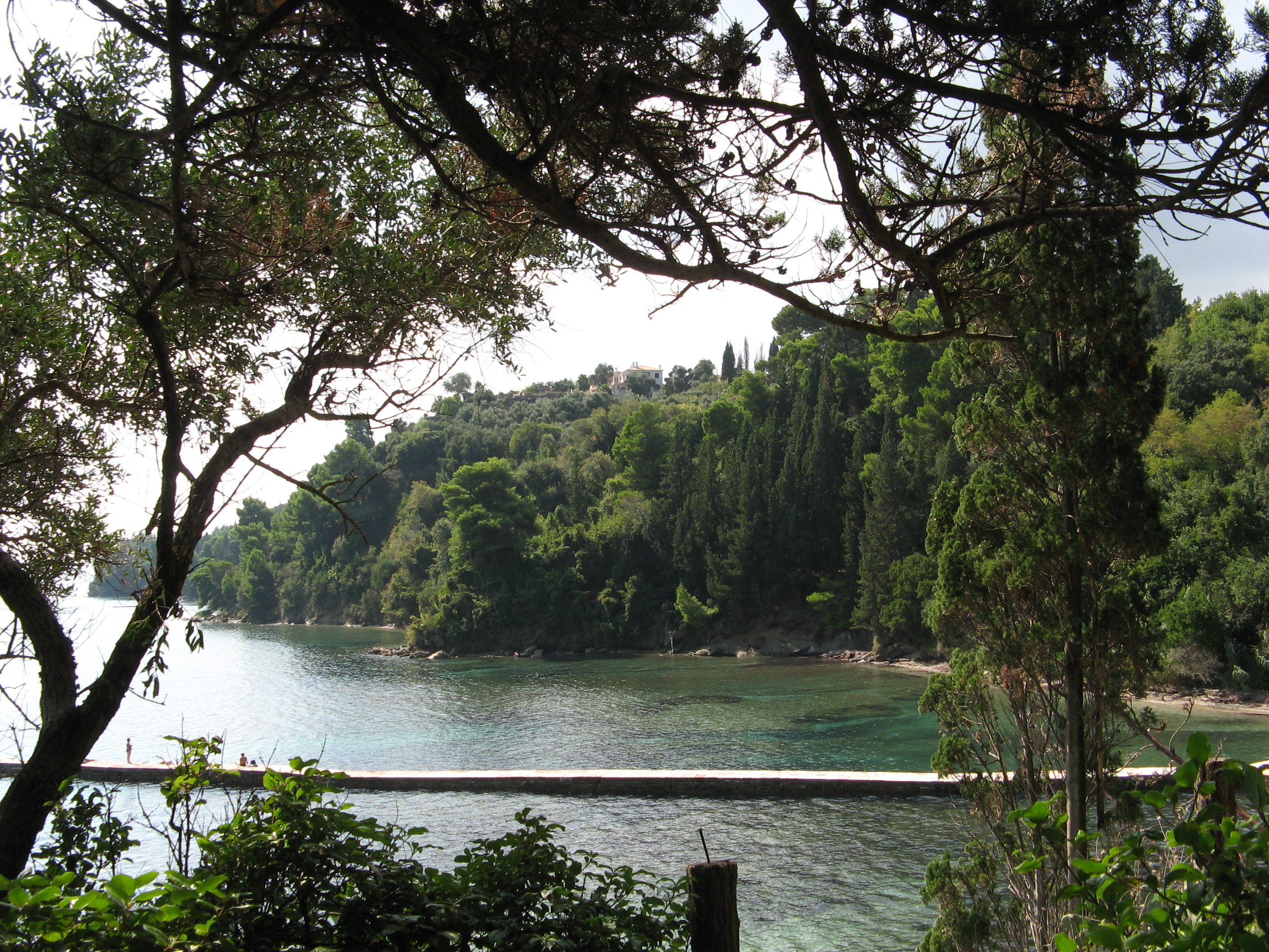 Park Schloss Monrepos (Korfu)